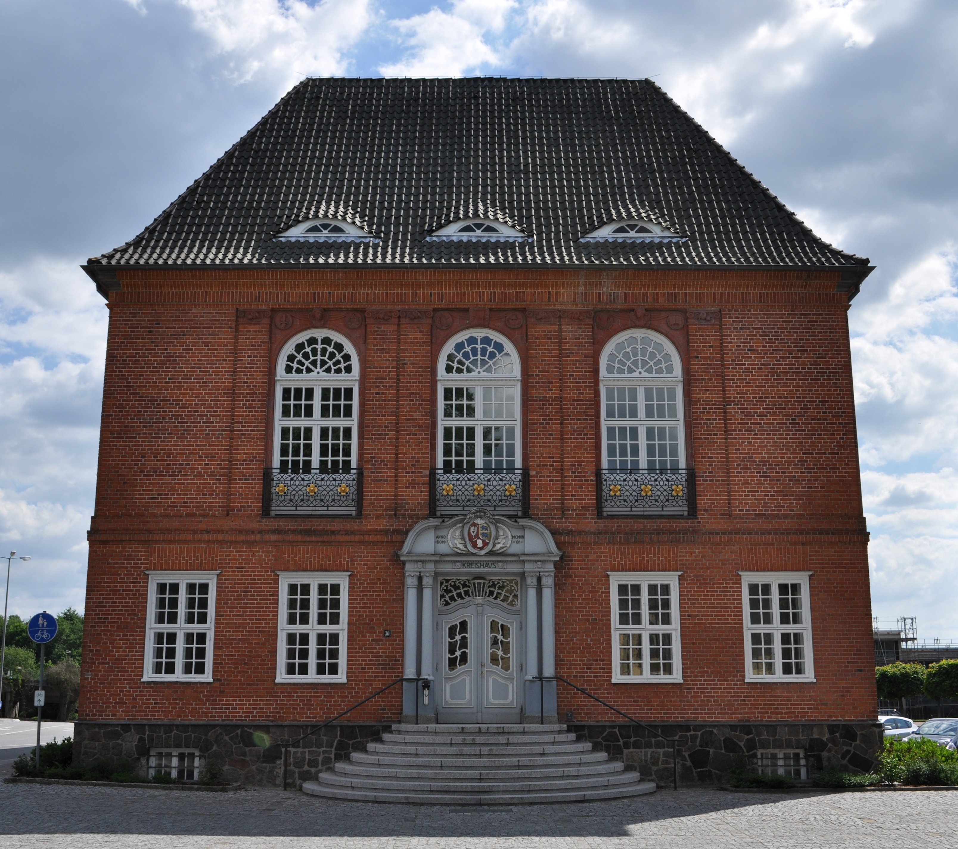 Kreishaus an der Hamburger Straße 30 in Bad Segeberg. This is a photograph of an architectural monument.